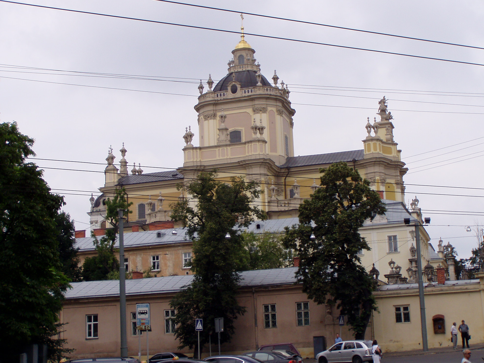 Katedra św. Jura we Lwowie